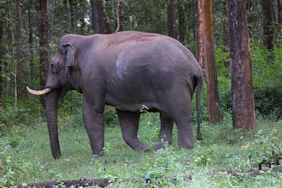 ഗജവീരനെ പകര്ത്തിയത് മൈസൂരിനടുത്തുള്ള കാട്ടിൽവച്ച്